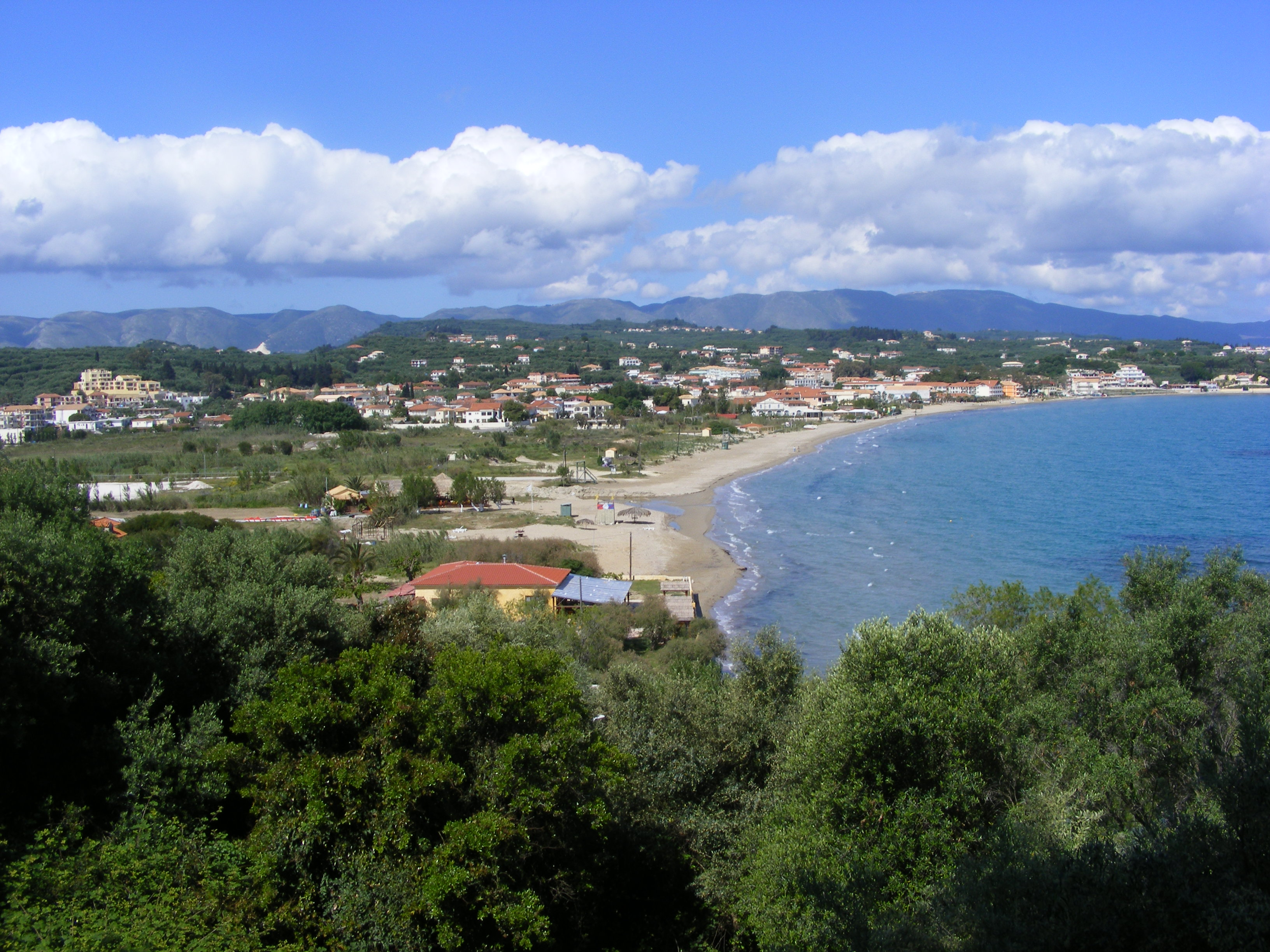 Zakynthos May 2009 Tsilivi